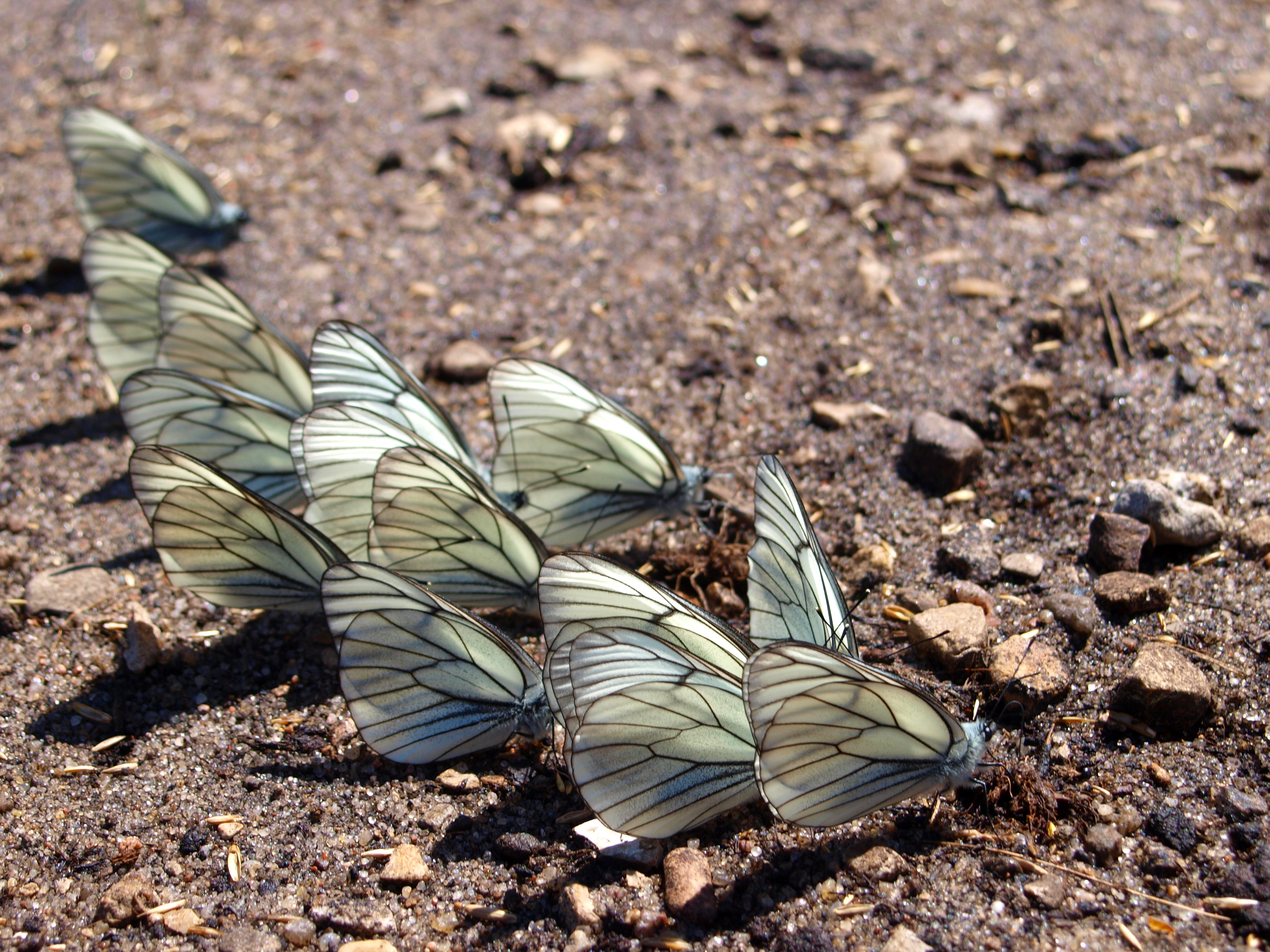 Põualiblikas Aporia crataegi